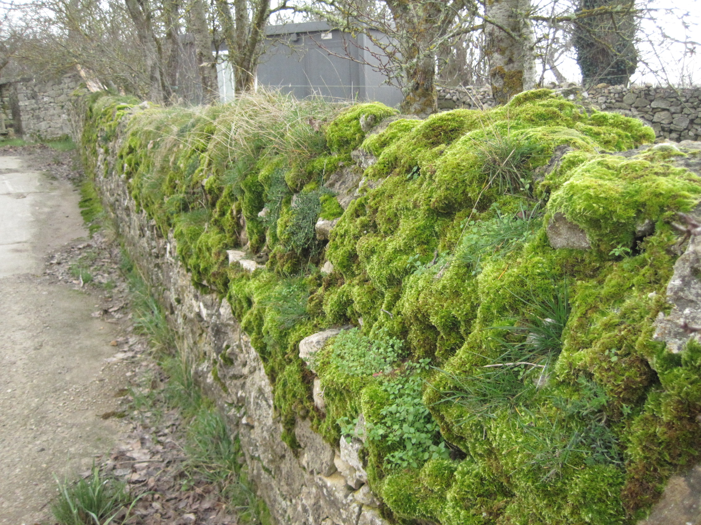 Musgo sobre un muro de piedra en la localidad de Puentetoma (Aguilar de Campoo, Palencia, España).